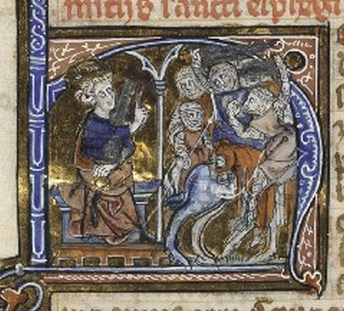 Henri II le Boiteux et son armée